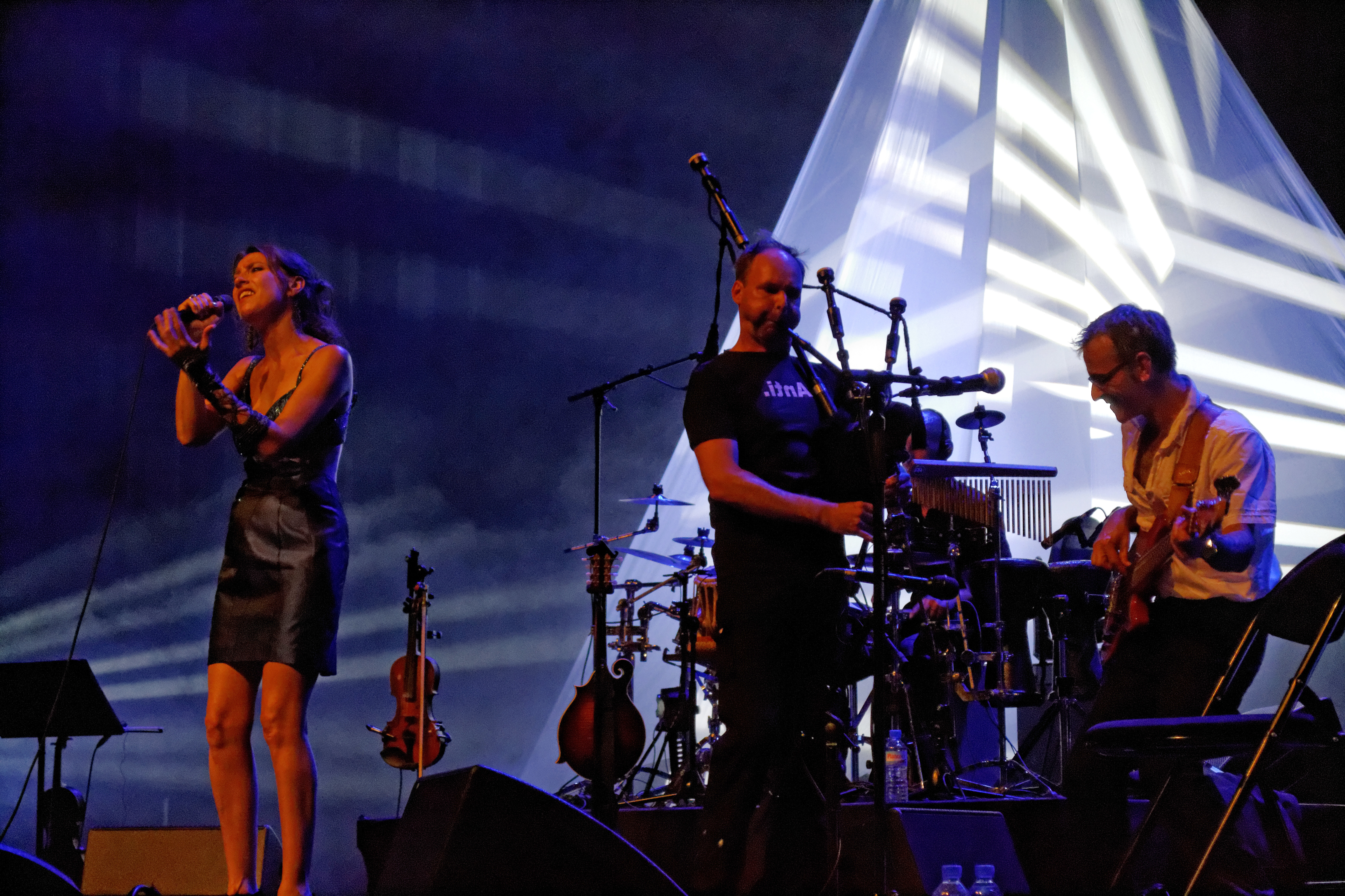 Mickaël Cozien avec Gwennyn en concert au théâtre de Cornouaille lors du festival de Cornouaille à Quimper le 25 juillet 2014.